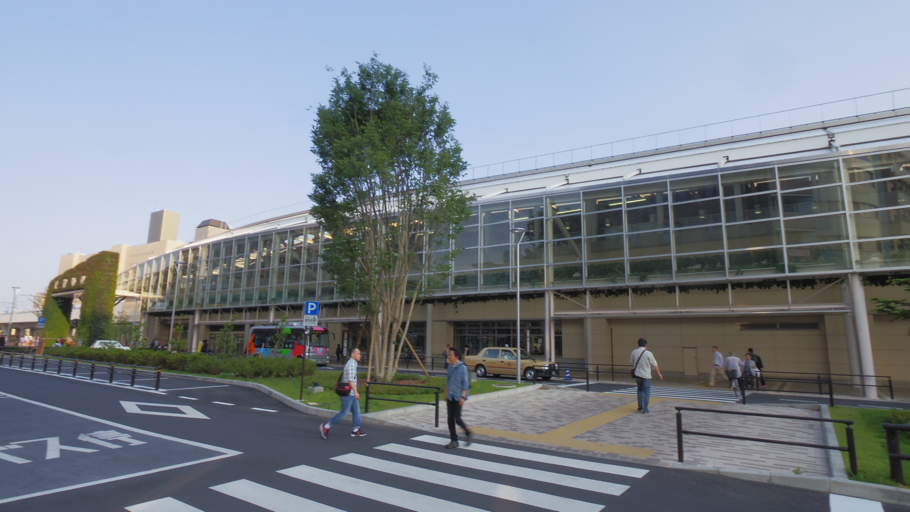 JR武蔵境駅北口駅舎（2016年5月22日撮影）